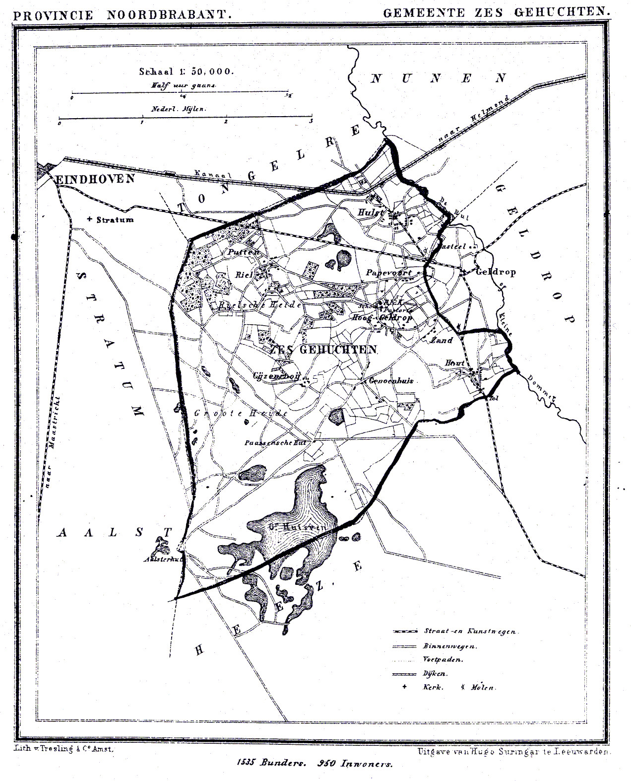 Nederland, Noord-Brabant, Gemeente Zes-Gehuchten